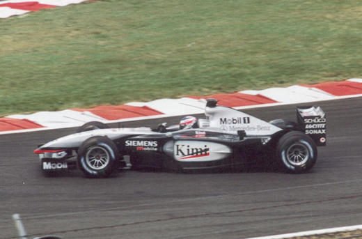 Kimi Raikkonen driving the MP4/17D